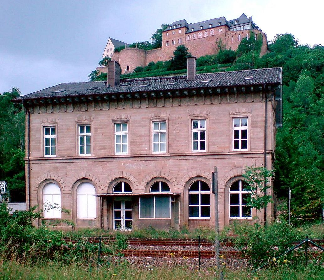 Der Bahnhof Ebernburg unter der Ebernburg, z.Z. Nutzung als sog. Kulturbahnhof.